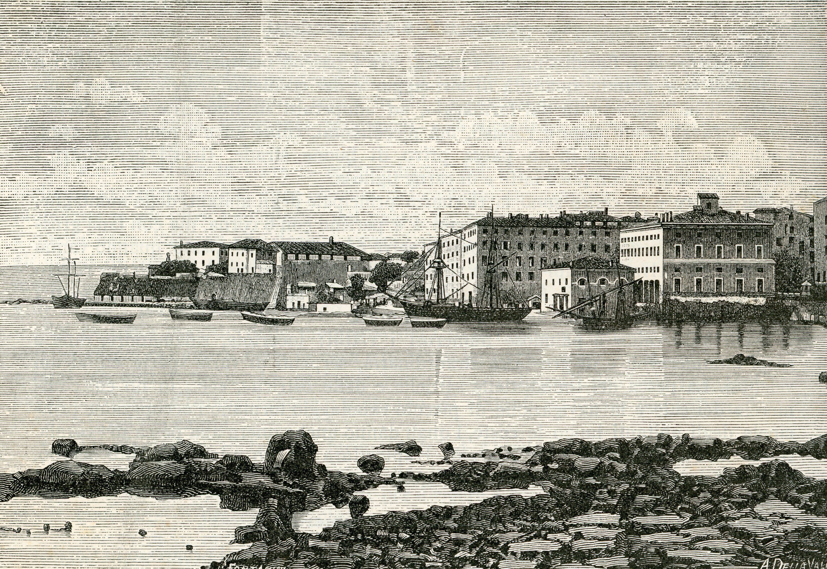 Ajaccio: veduta del porto (Fontanini, Della Valle 1894).